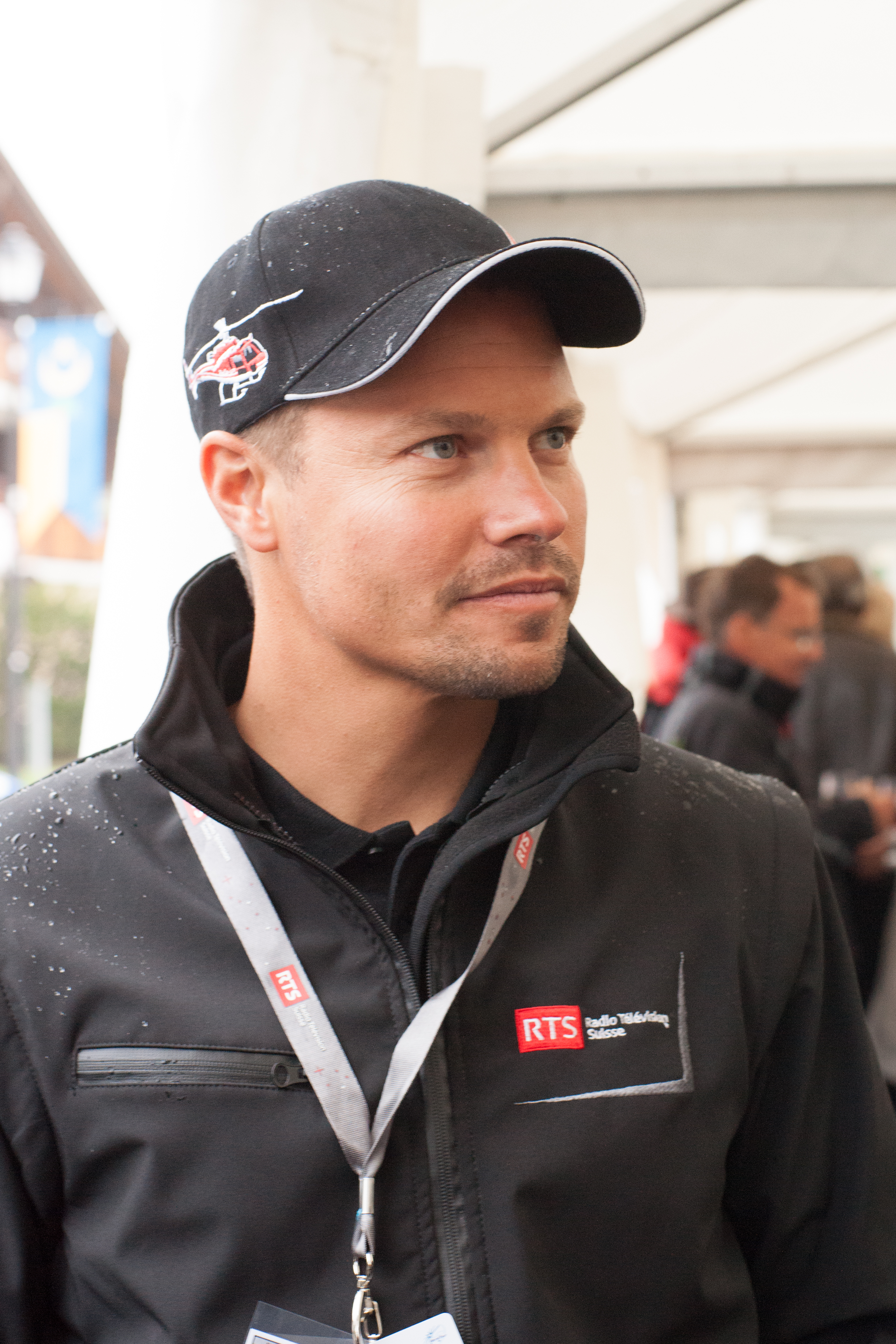 Tour de Romandie 2013, 4ème étape, Aurélien Clerc